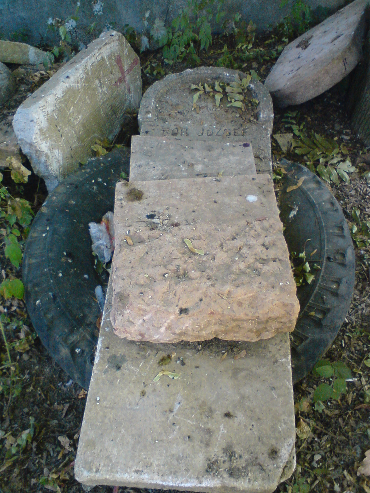 Cimitirul Olosig din Oradea